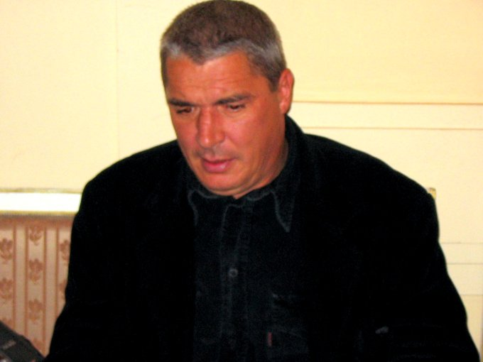 Andrzej Stasiuk, Polish writer